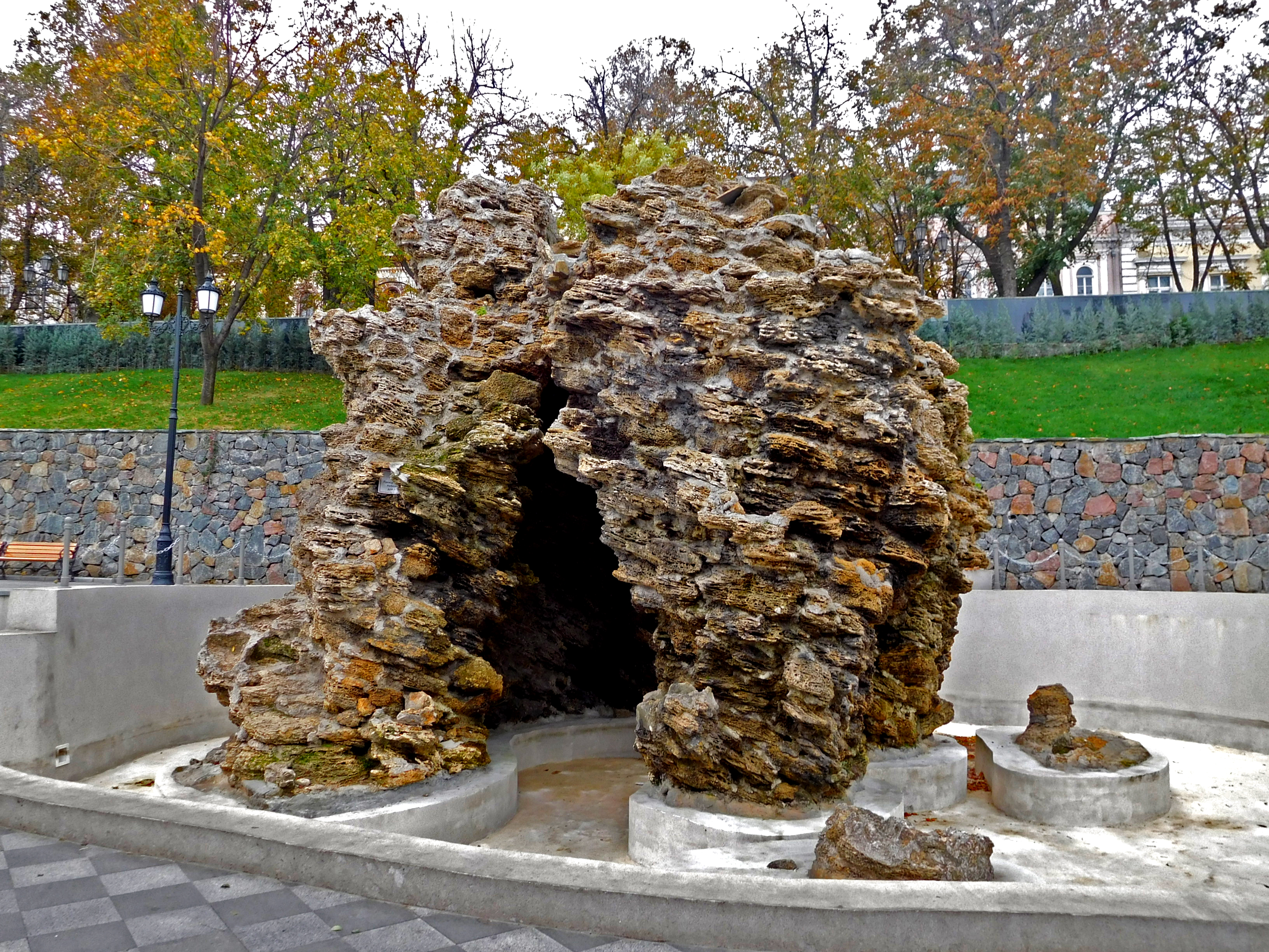 Стамбульський парк, Одеса